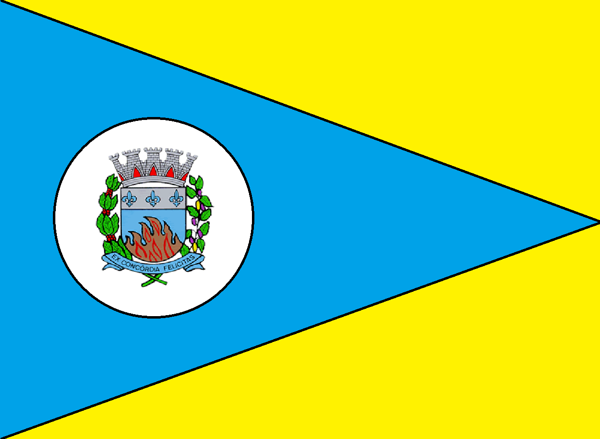 Bandeira do Municipio de Auriflama